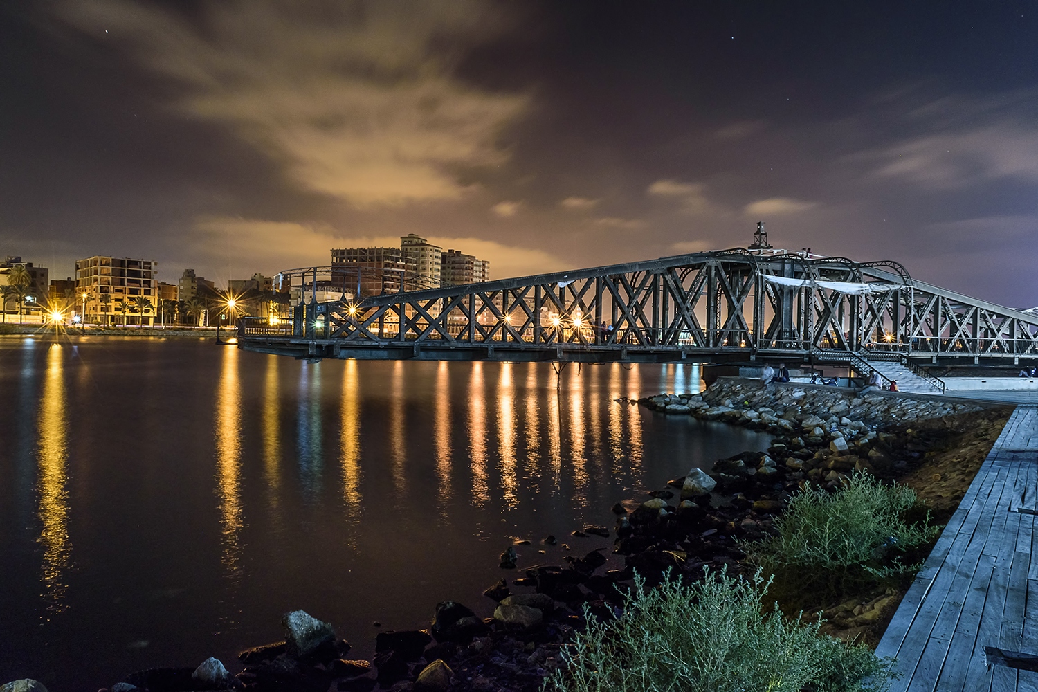 تصوير ليلي للجزء المتبقي من كوبري دمياط التاريخي والمسمى كوبري الحضارة